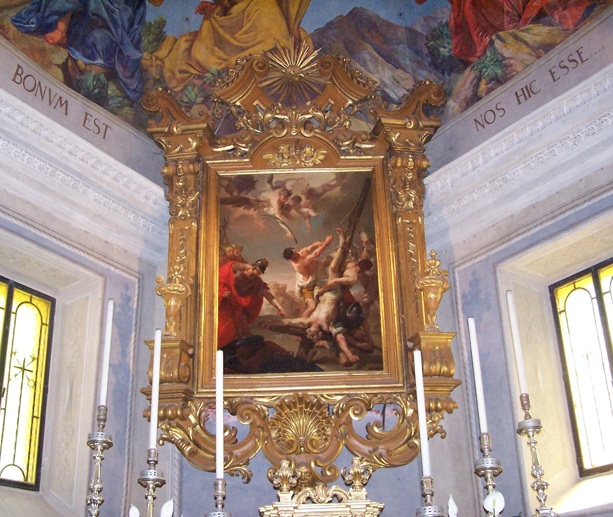 Veduta della chiesa di Carignano (Parma) con pala di Gaetano Gandolfi Martirio di San Pietro.